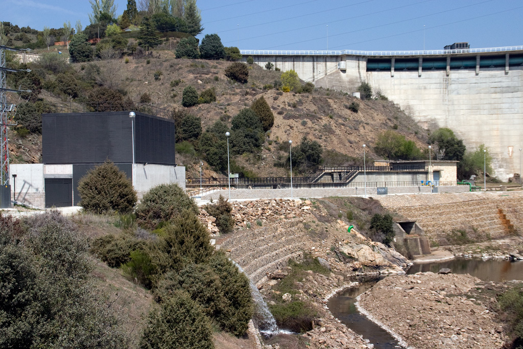 Minicentral de Pedrezuela. Presa y tubo del Canal Alto.